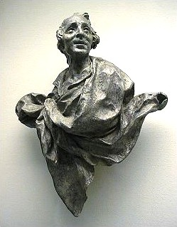 Bleiguss von J.C.Wentzinger im Wentzingerhaus